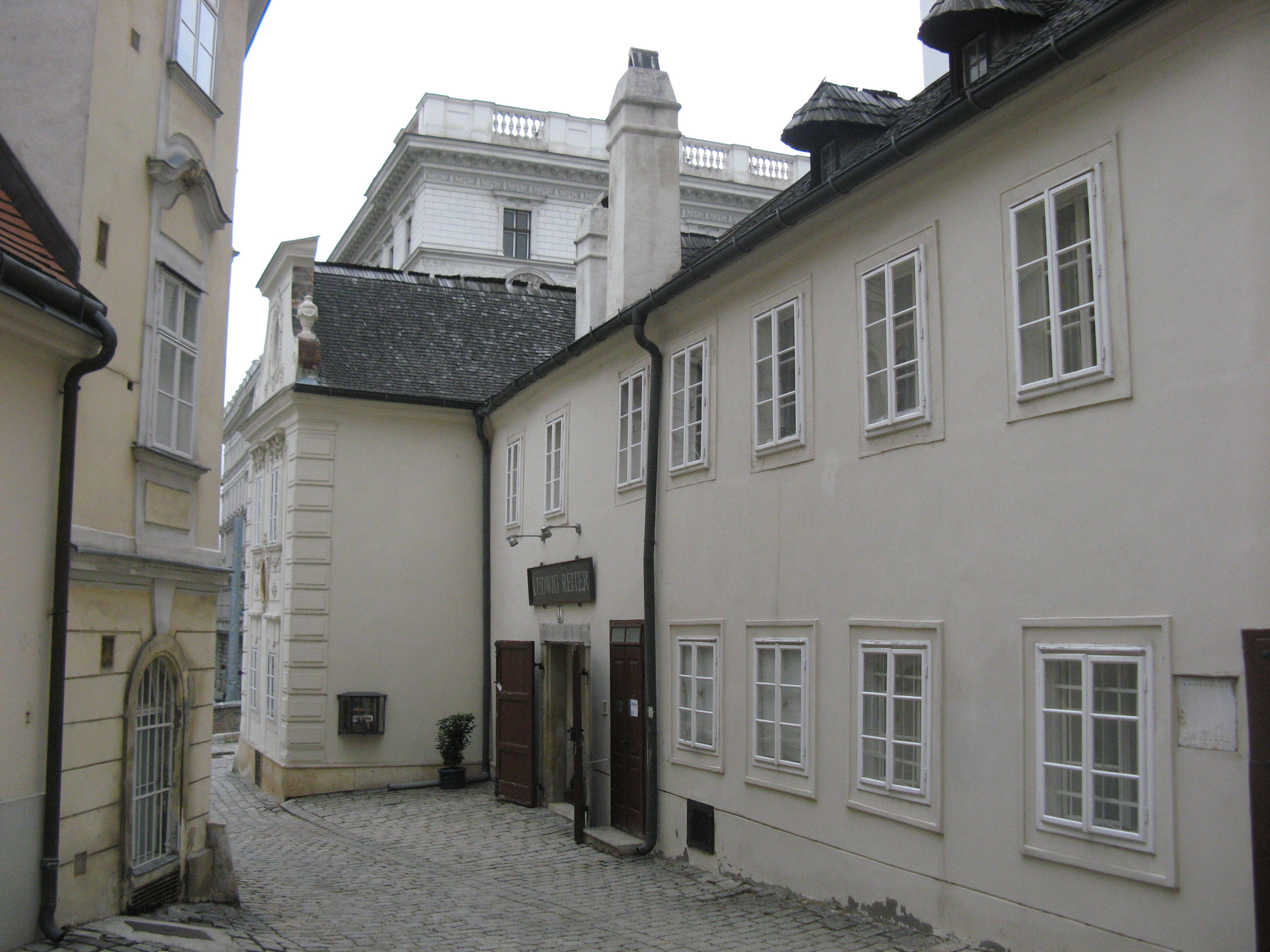 Mölker Steig, Wien-Innere Stadt